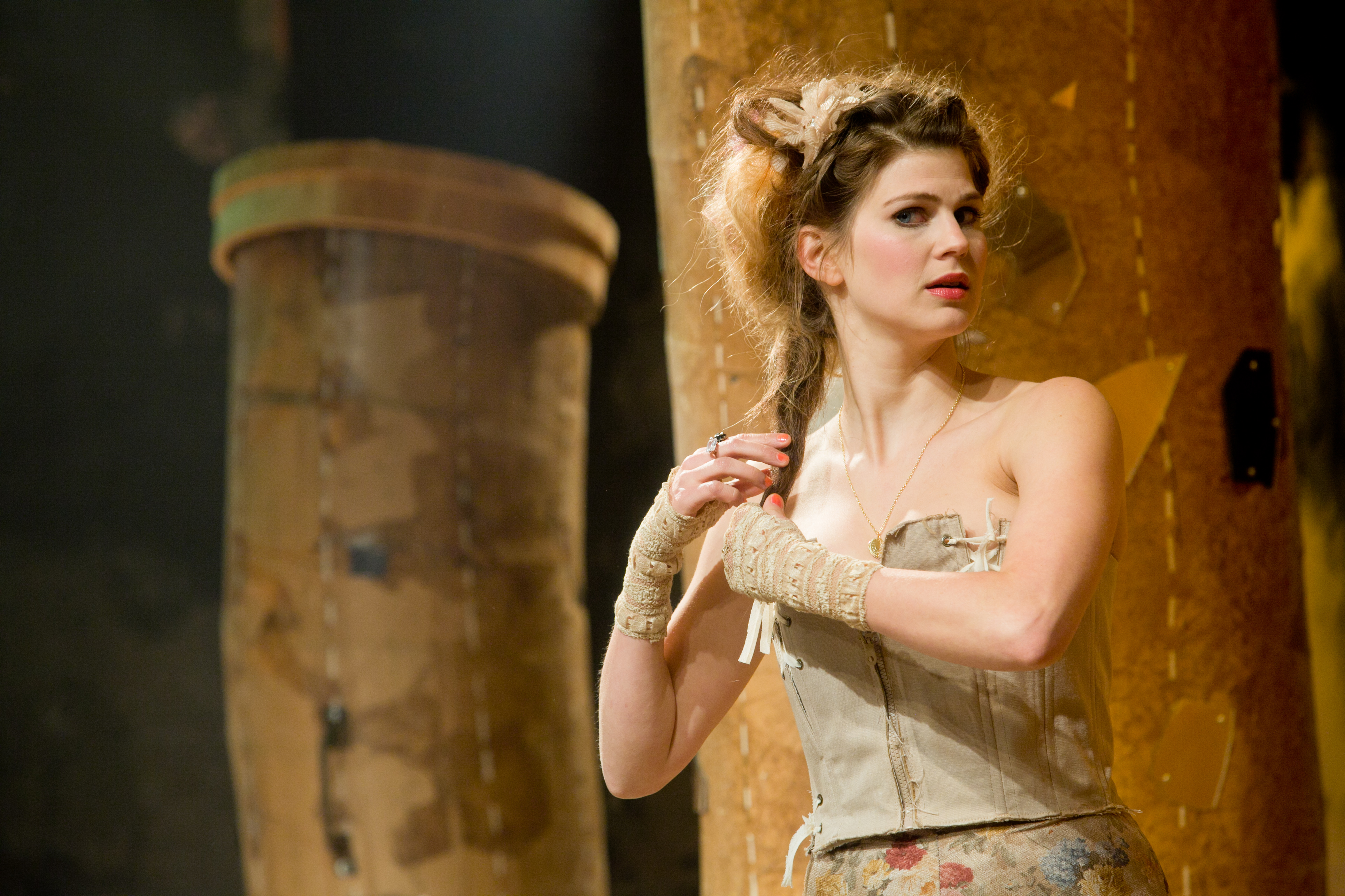 הלילה השנים עשר, תיאטרון החאן